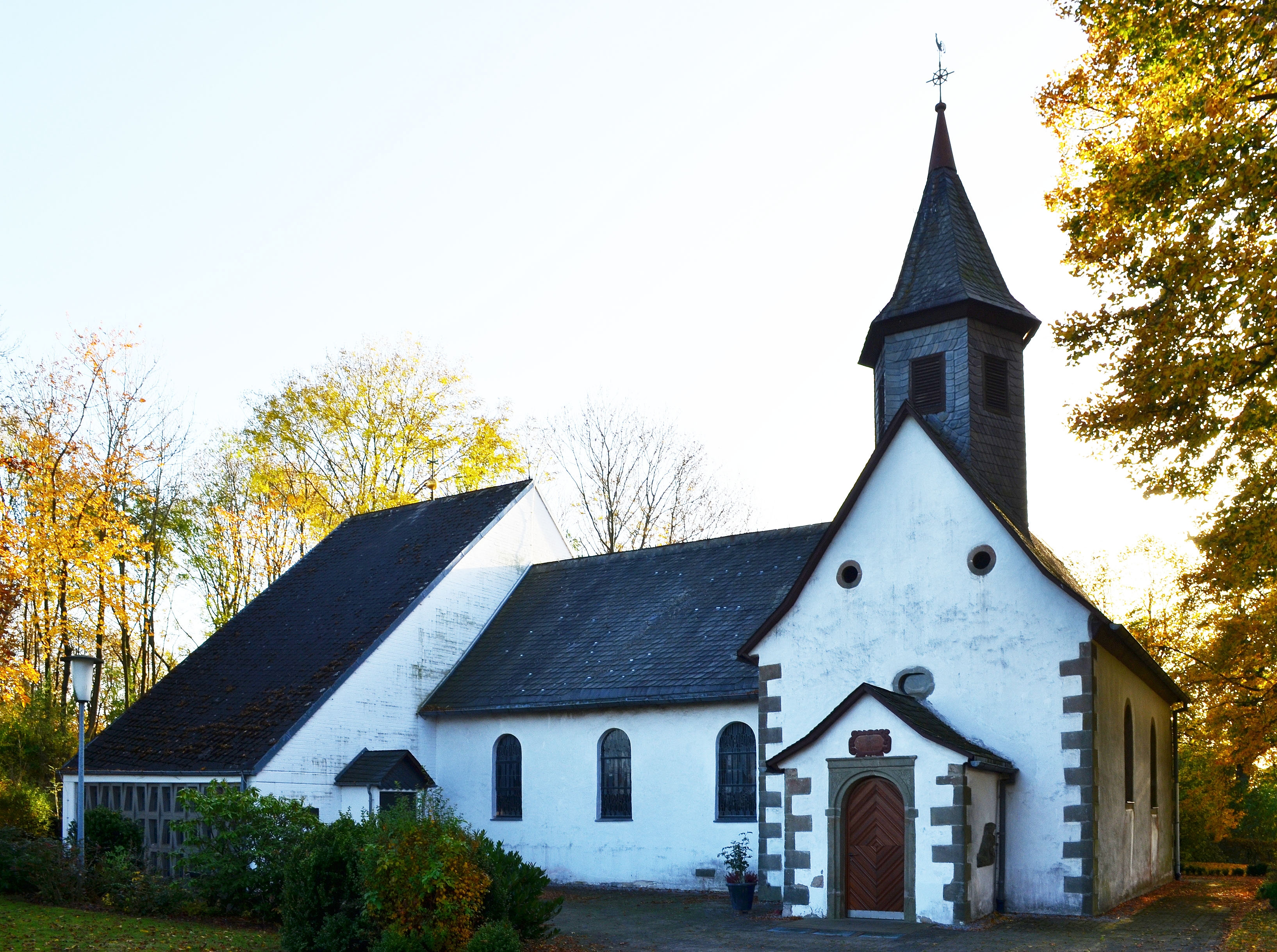 Brilon, Wülfte St. Anna Gesamtansicht 3